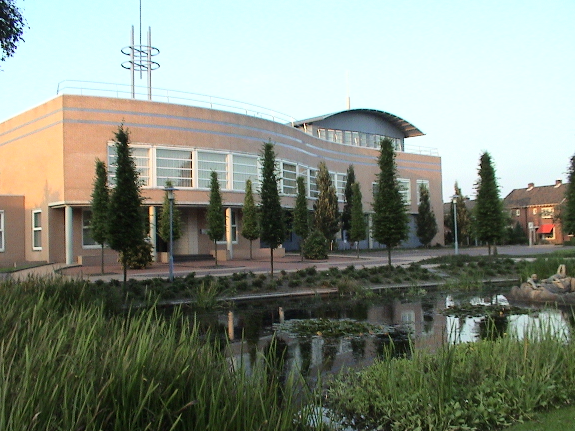 Hoofdingang Gemeentehuis Wierden.